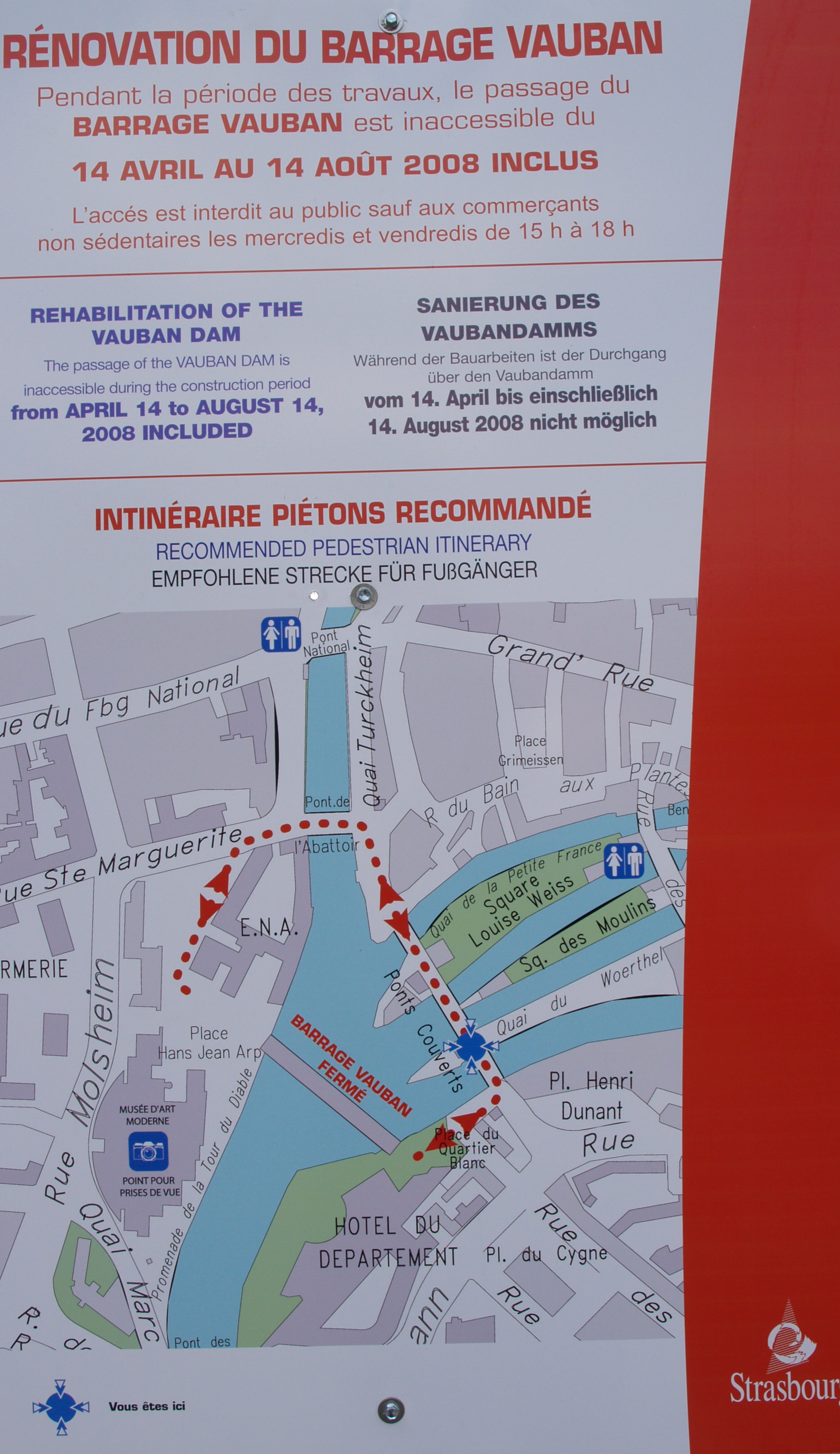 Panneau se trouvant sur les ponts couverts de Strasbourg